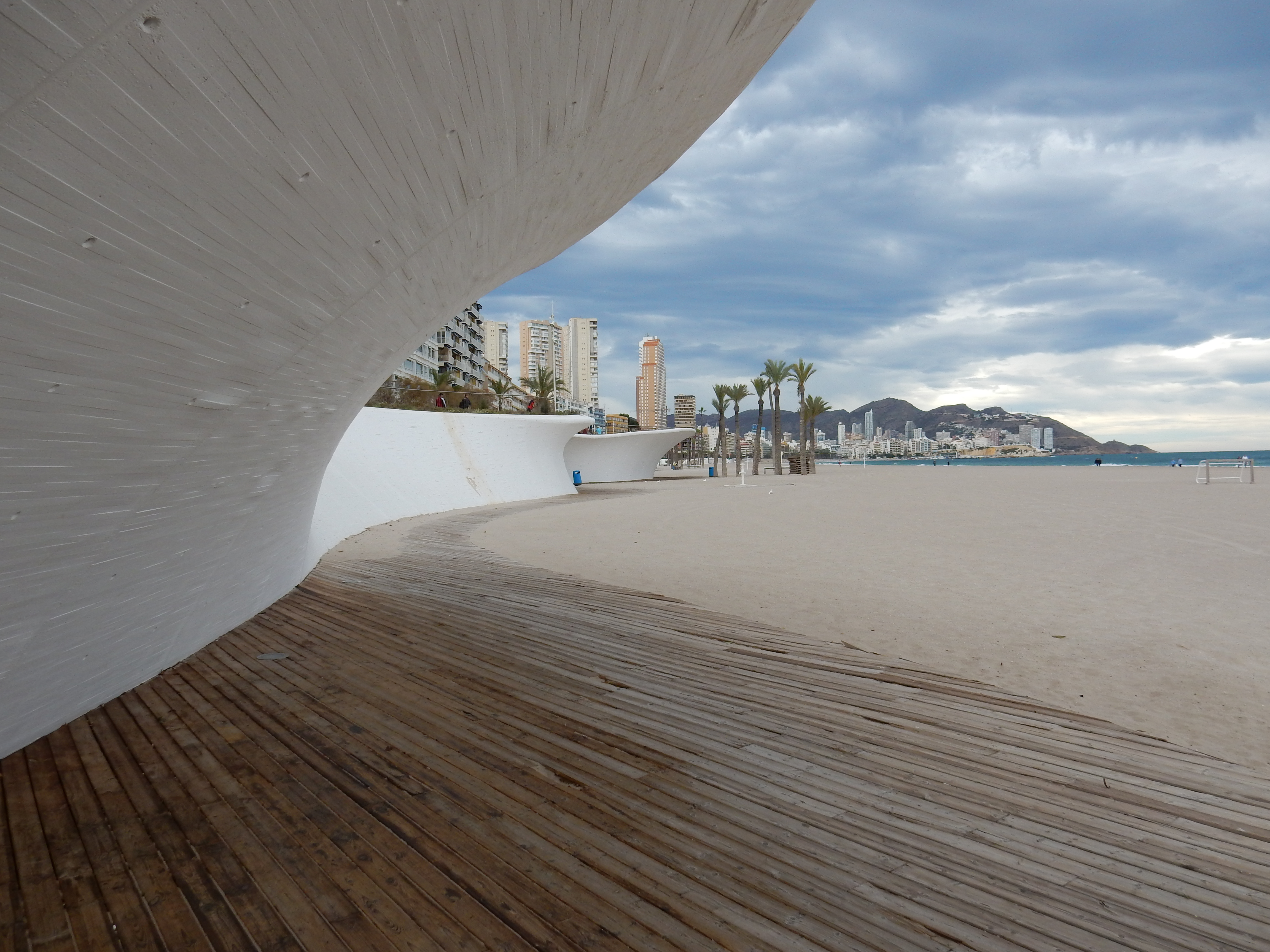 Benidorm, Spain